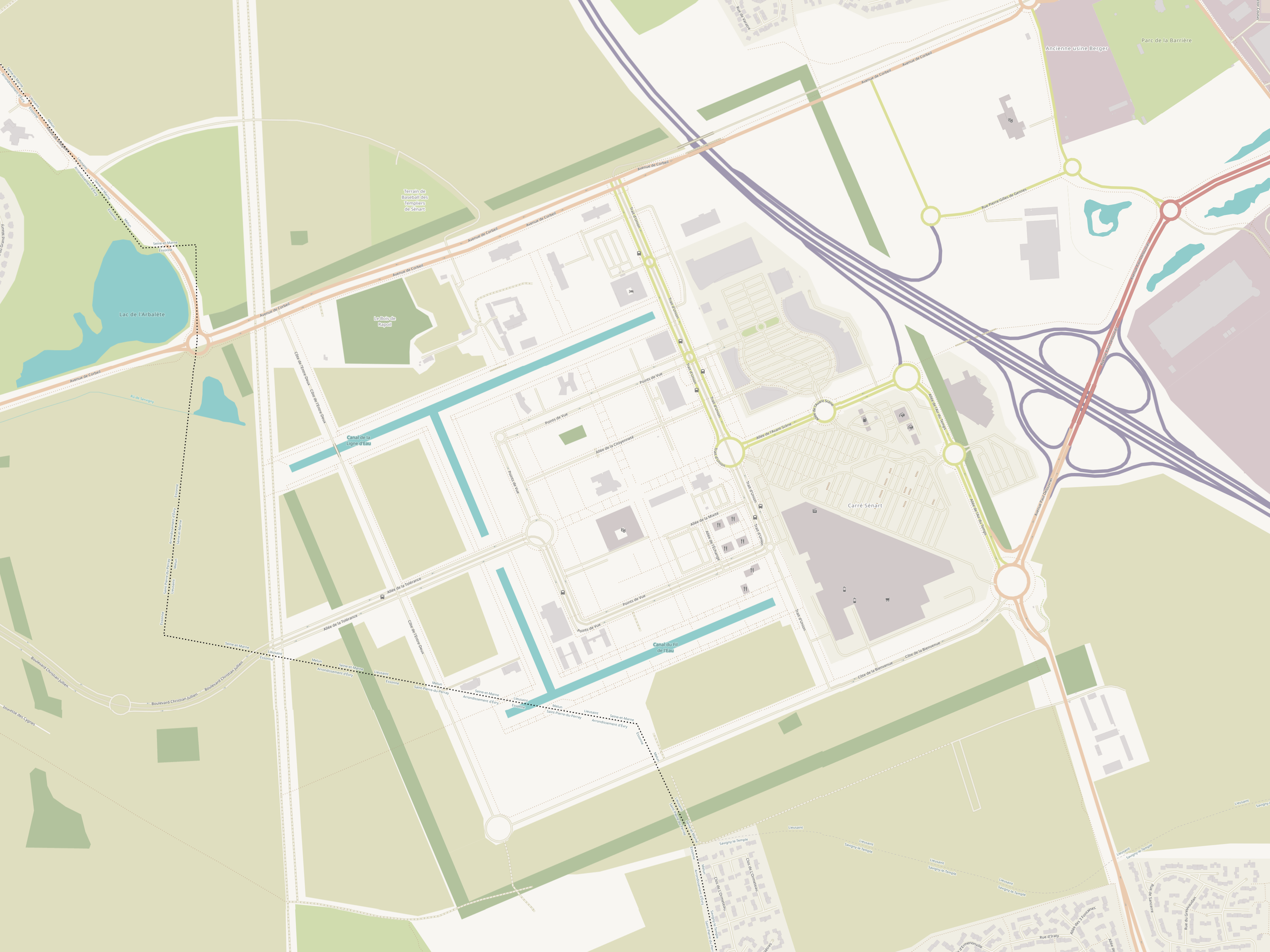 Plan de la zone d'activité de Carré Sénart, situé à Lieussaint en Seine et Marne et à Saint-Pierre du Perray en Essonne. Plan extrait d'OpenStreetMap le 30 juin 2019 et retouché avec Inkscape